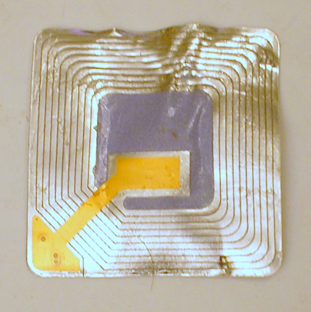 Photo d'un antivol magnétique